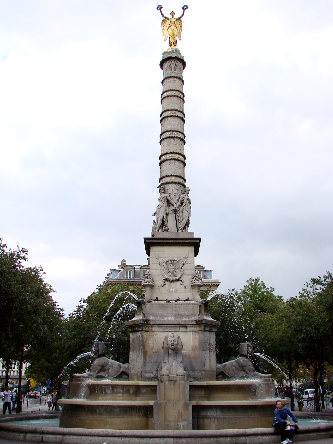 la Fontaine du Palmier, Place du Châtelet à Paris (1808). Sculptures allégoriques par Louis-Simon Boizot, sphynx par Gabriel Davioud.